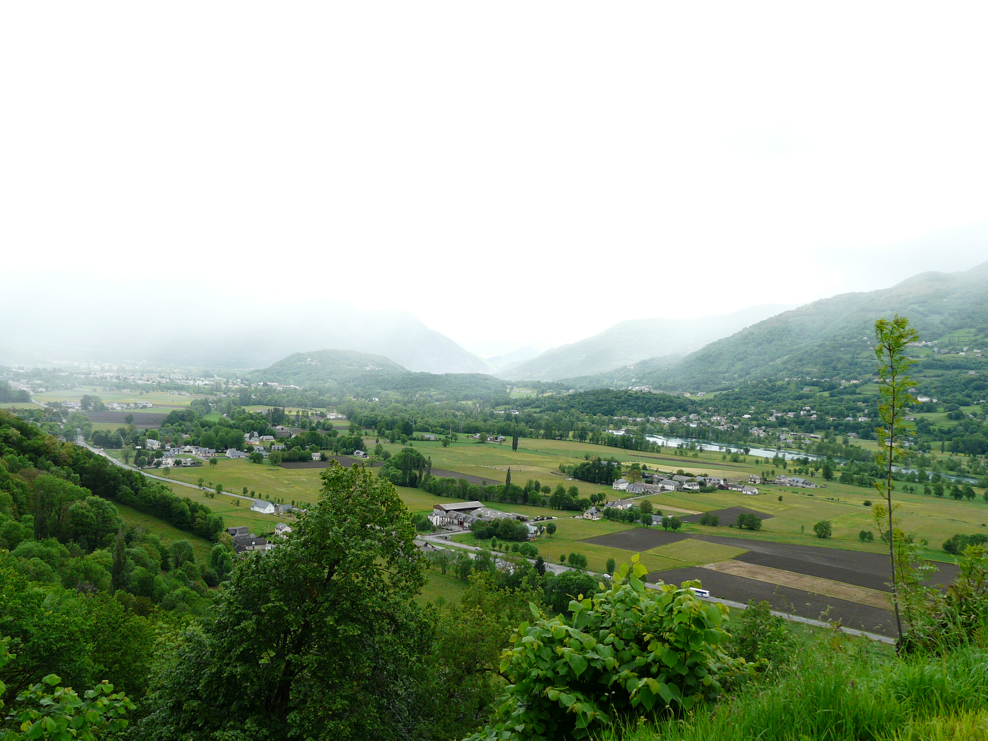 La vallée du gave de Pau, Saint-Savin, Hautes-Pyrénées, France.